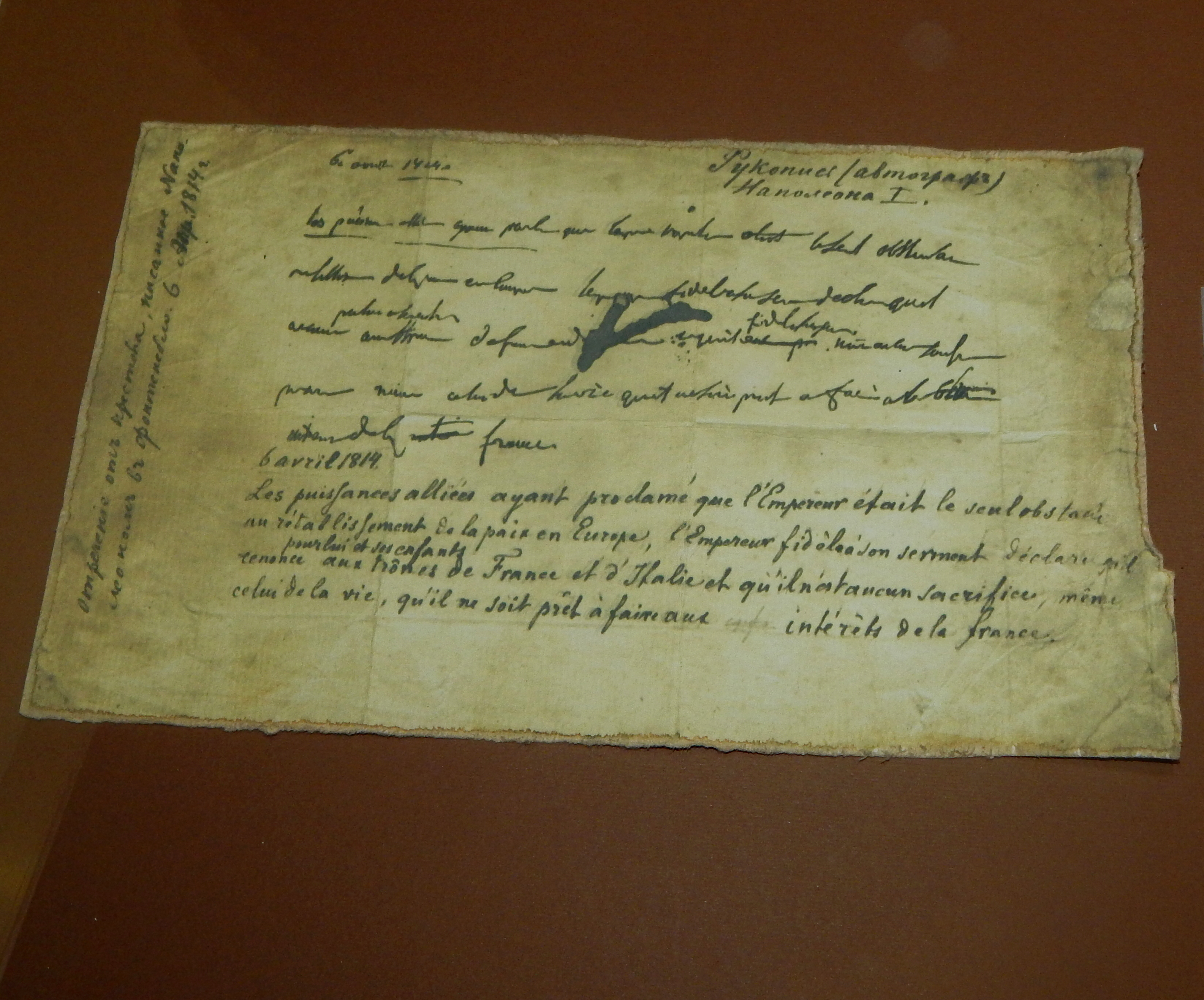 Նապոլեոն Բոնապարտի հրաժարական